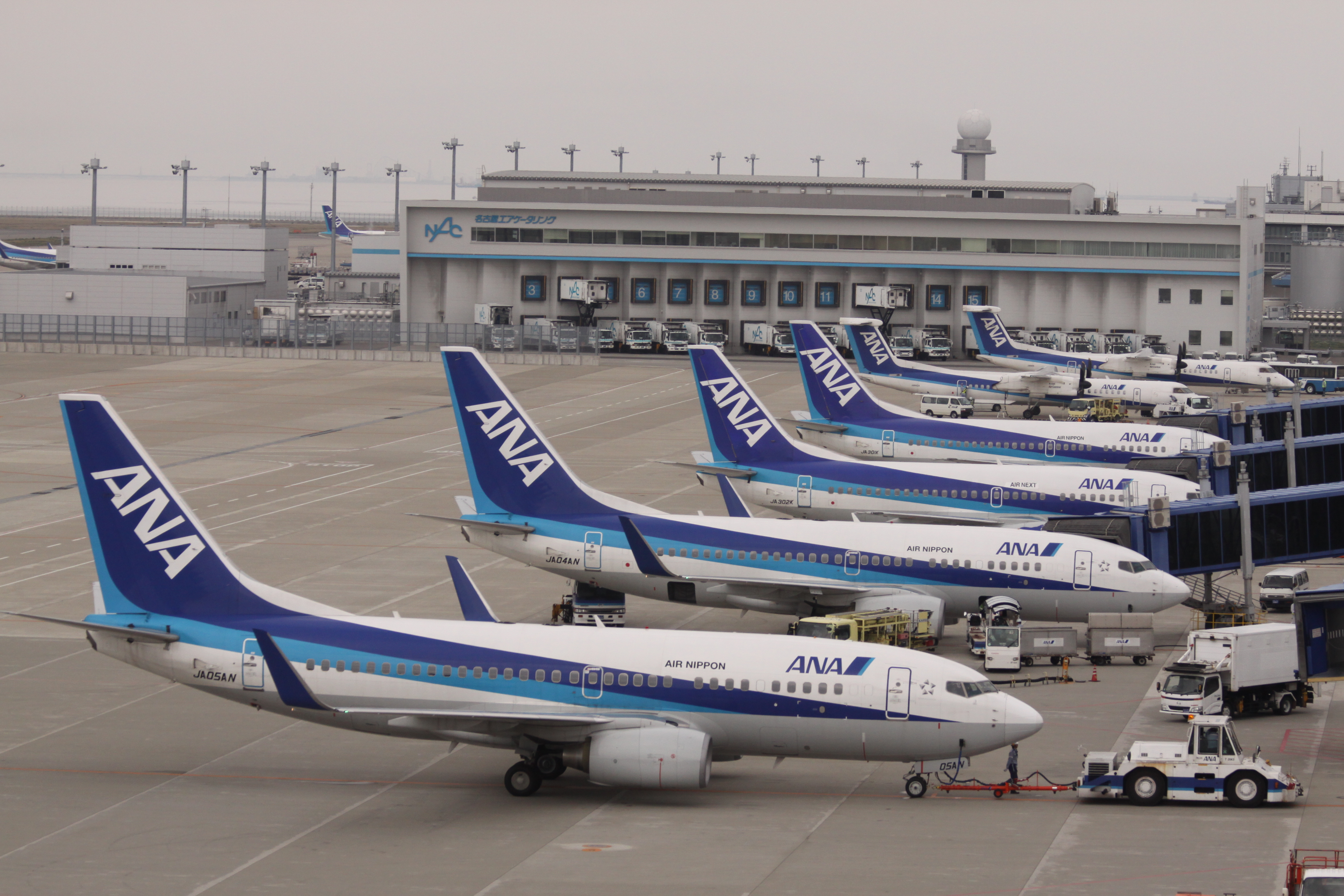 ANA